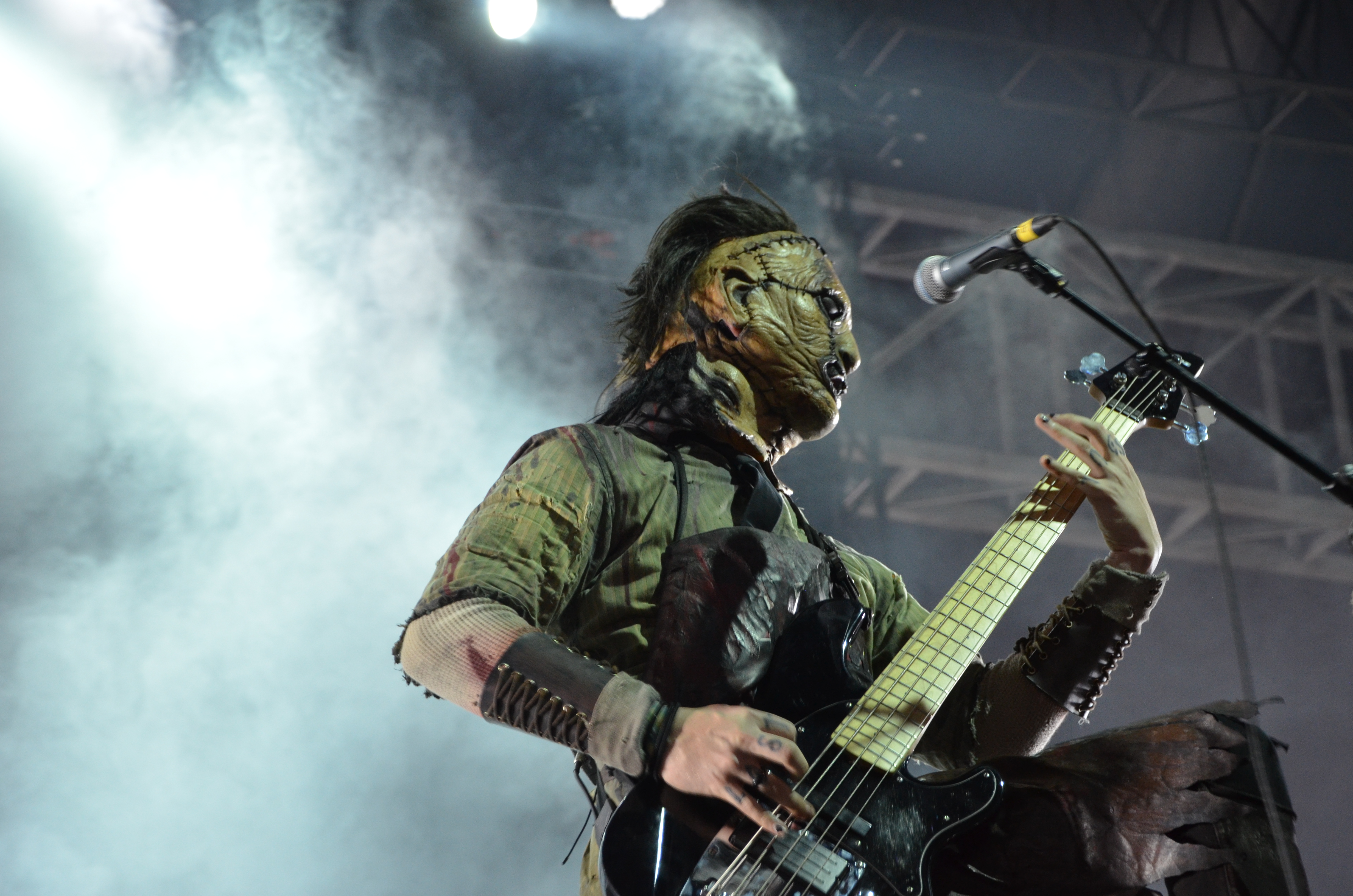 Devin "Ghost" Sola von Motionless in White im Alternatent bei Rock am Ring 2015 in Mendig.